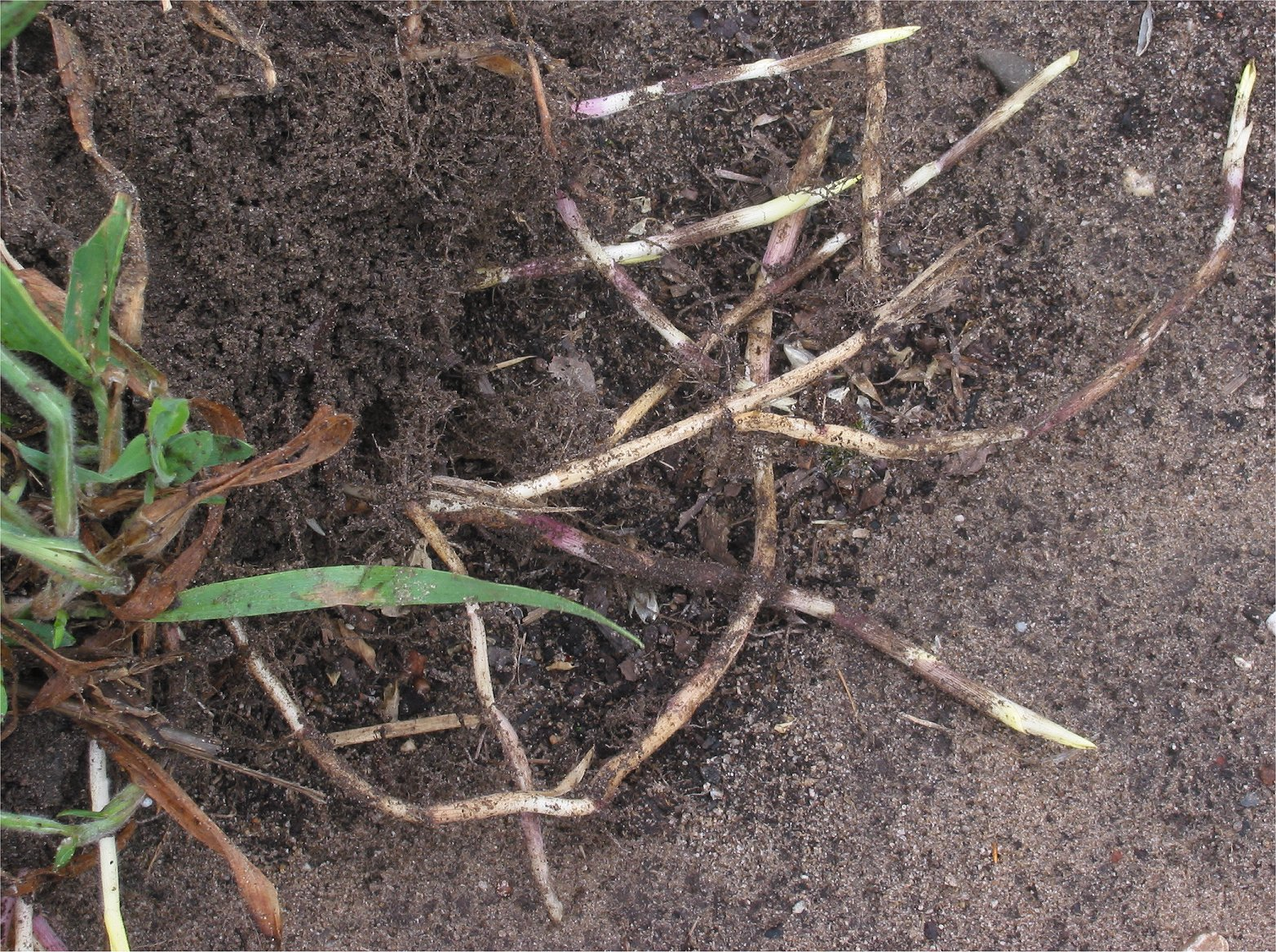 (nl: Gladde witbol uitlopers) rhizomes Holcus mollis